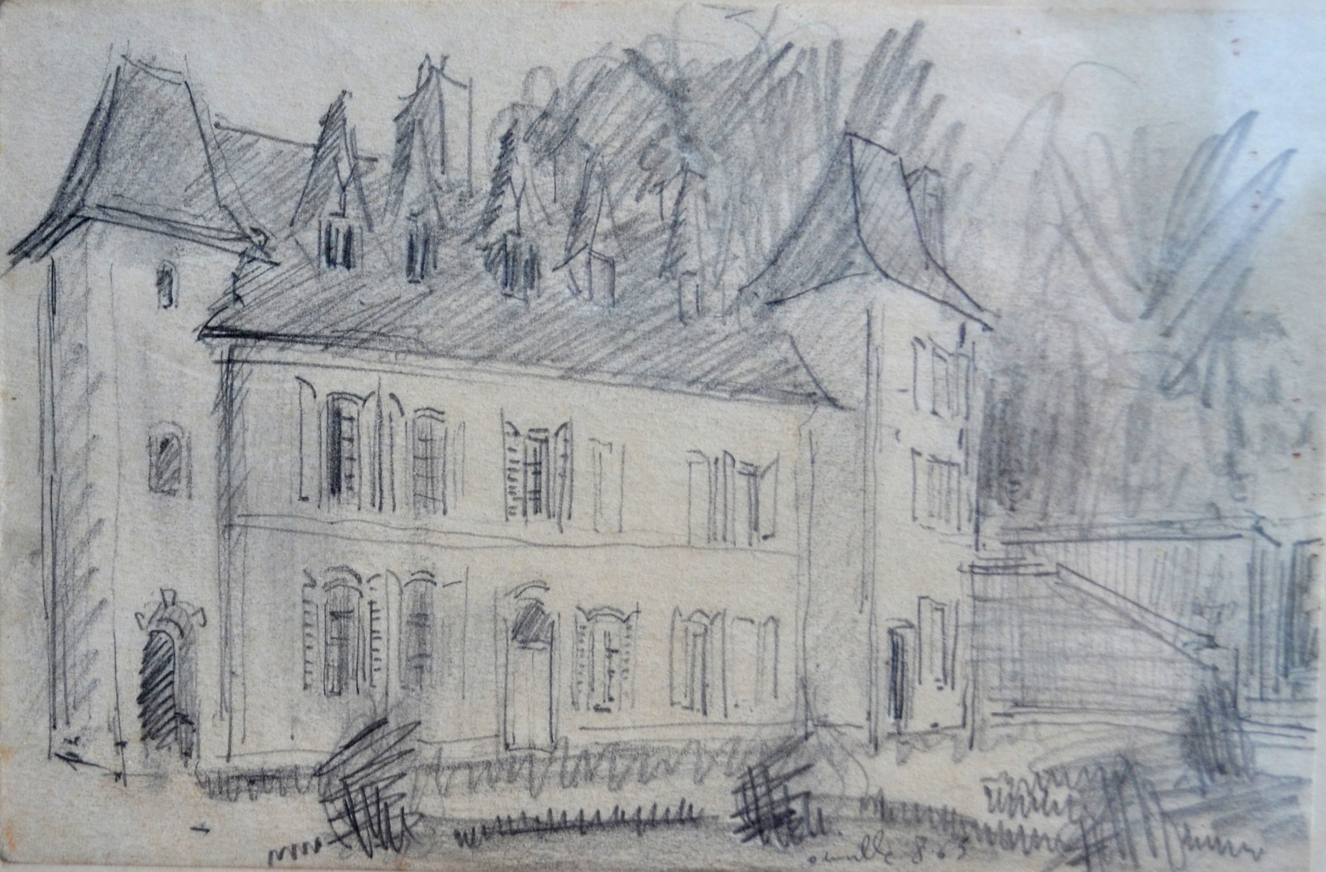 Croquis mine de plomb d'après nature en aout 1965, annoté Oinville 8 65